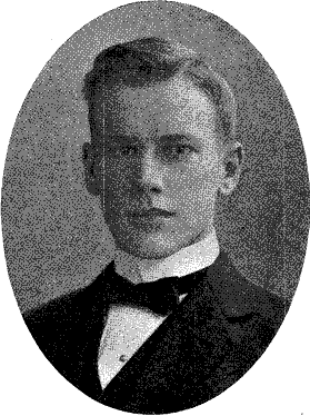 Torsten Heurlinger (1893-1927), Swedish physicist